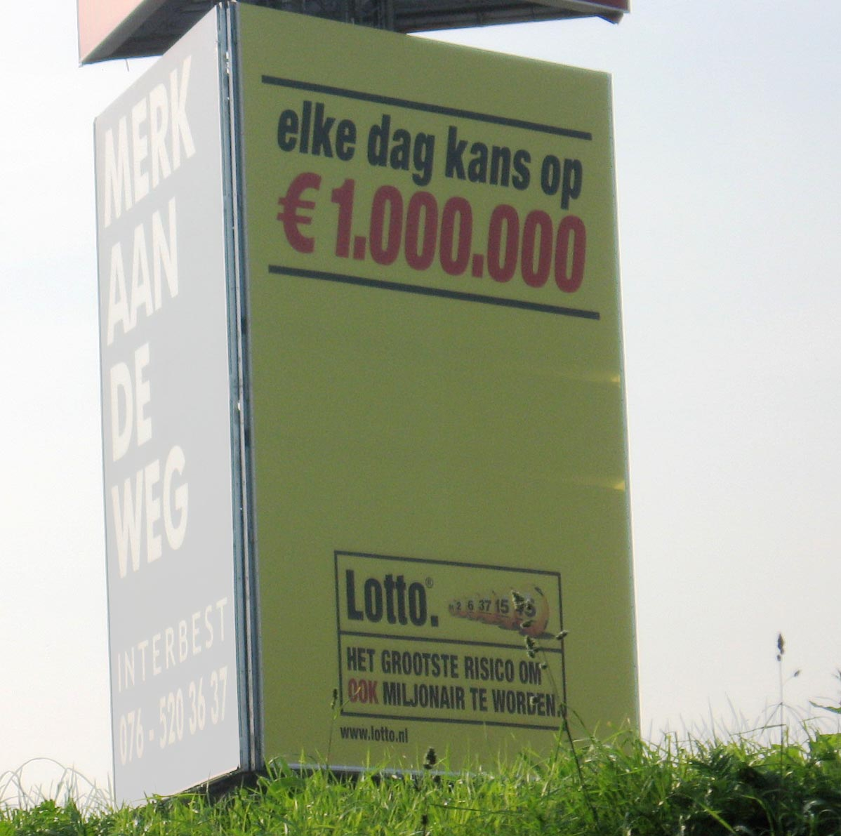 reclamebord Lotto langs A13